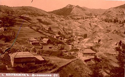 Изглед от с. Кестенджик (с. Кестен, Смолянско).